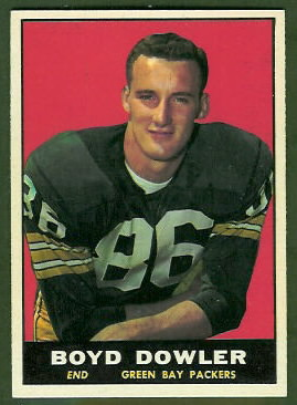 1961 Topps #43: Boyd Dowler